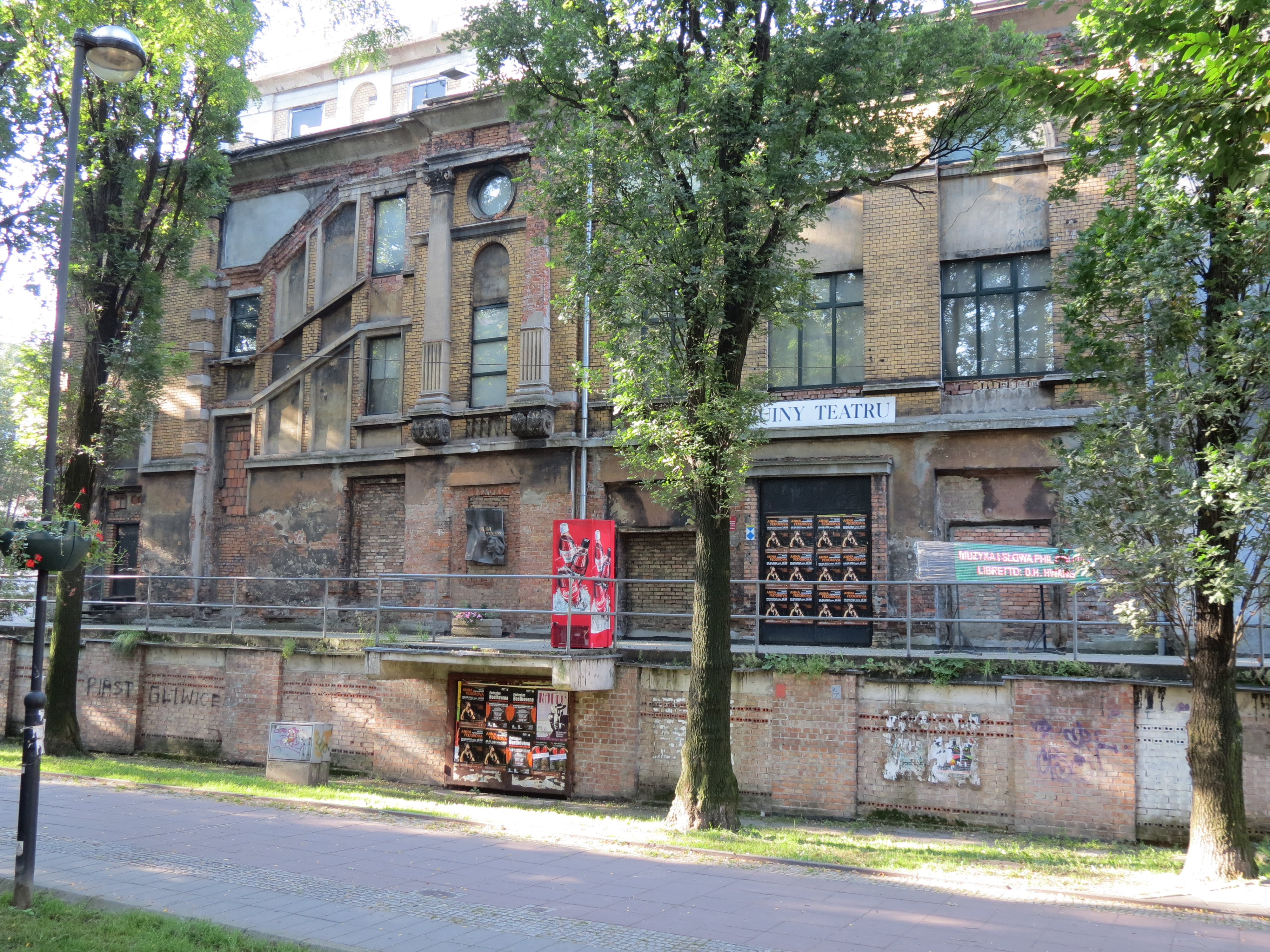 Gliwice, Aleja Przyjaźni - ruiny Teatru Miejskiego, wzniesionego w 1890 r. (zabytek nr A/1655/97)